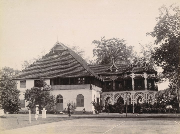 ബോൾഗാട്ടി പാലസ്. പതിനെട്ടാം നൂറ്റാണ്ടിൽ പോർച്ചുഗീസുകാരെ തുരത്തിയ ഡച്ചു വ്യാപാരികൾ നിർമിച്ചതാണിത്. 1744-ലാണ് നിർമിക്കപ്പെട്ടത്. നെതർലാന്റ്സിനു വെളിയിൽ ഡച്ചു രീതിയിൽ നിർമിക്കപ്പെട്ട ഏറ്റവും പഴയ കൊട്ടാരമാണിത്. 1900-ൽ സക്കറിയാസ് ഡിക്രൂസ് എടുത്ത ഫോട്ടോ. സ്രോതസ്സ്: ബ്രിട്ടീഷ് ലൈബ്രറി.